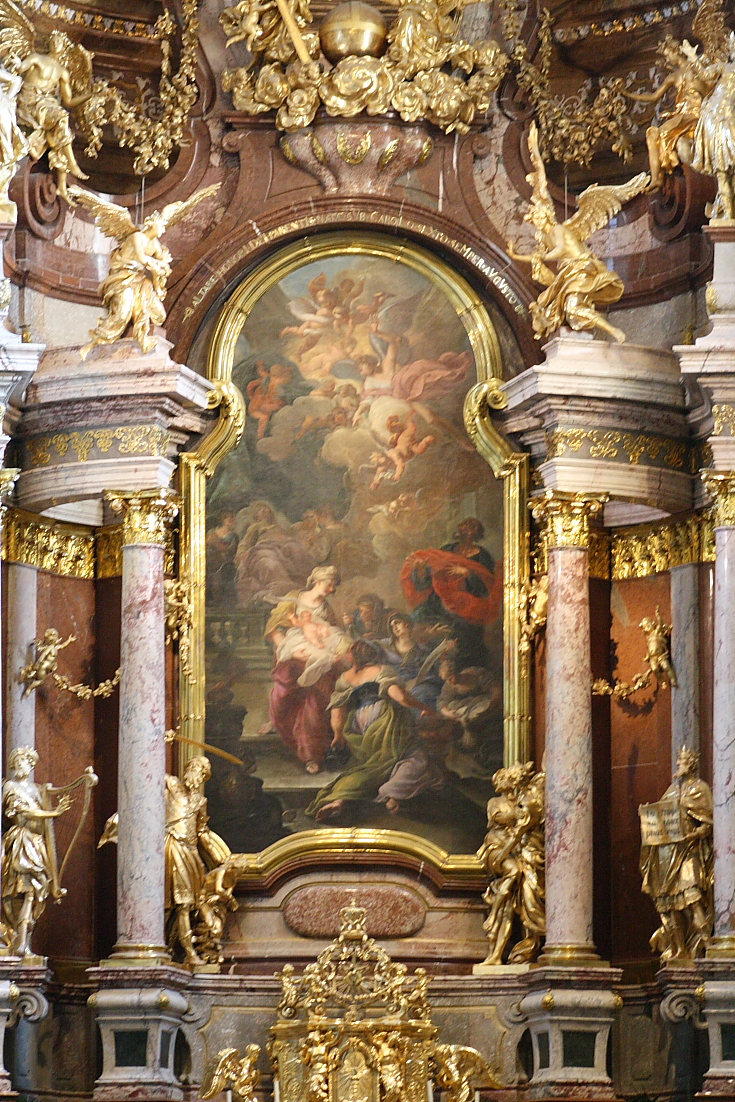 Das Hochaltarbild in der Stiftskirche Klosterneuburg in Niederösterreich von Johann Georg Schmidt.